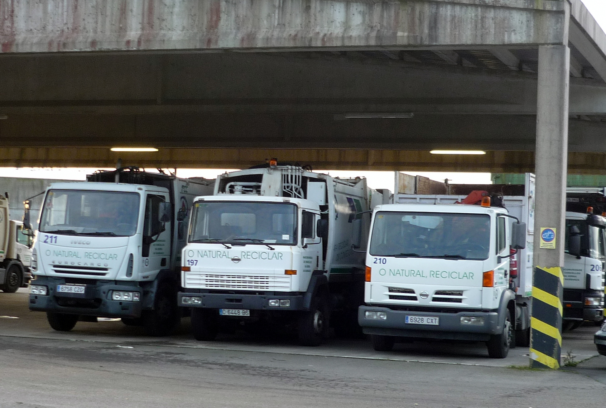 Planta de reciclaxe sita no Concello de Lousame (lindando con Rois, en Servia)